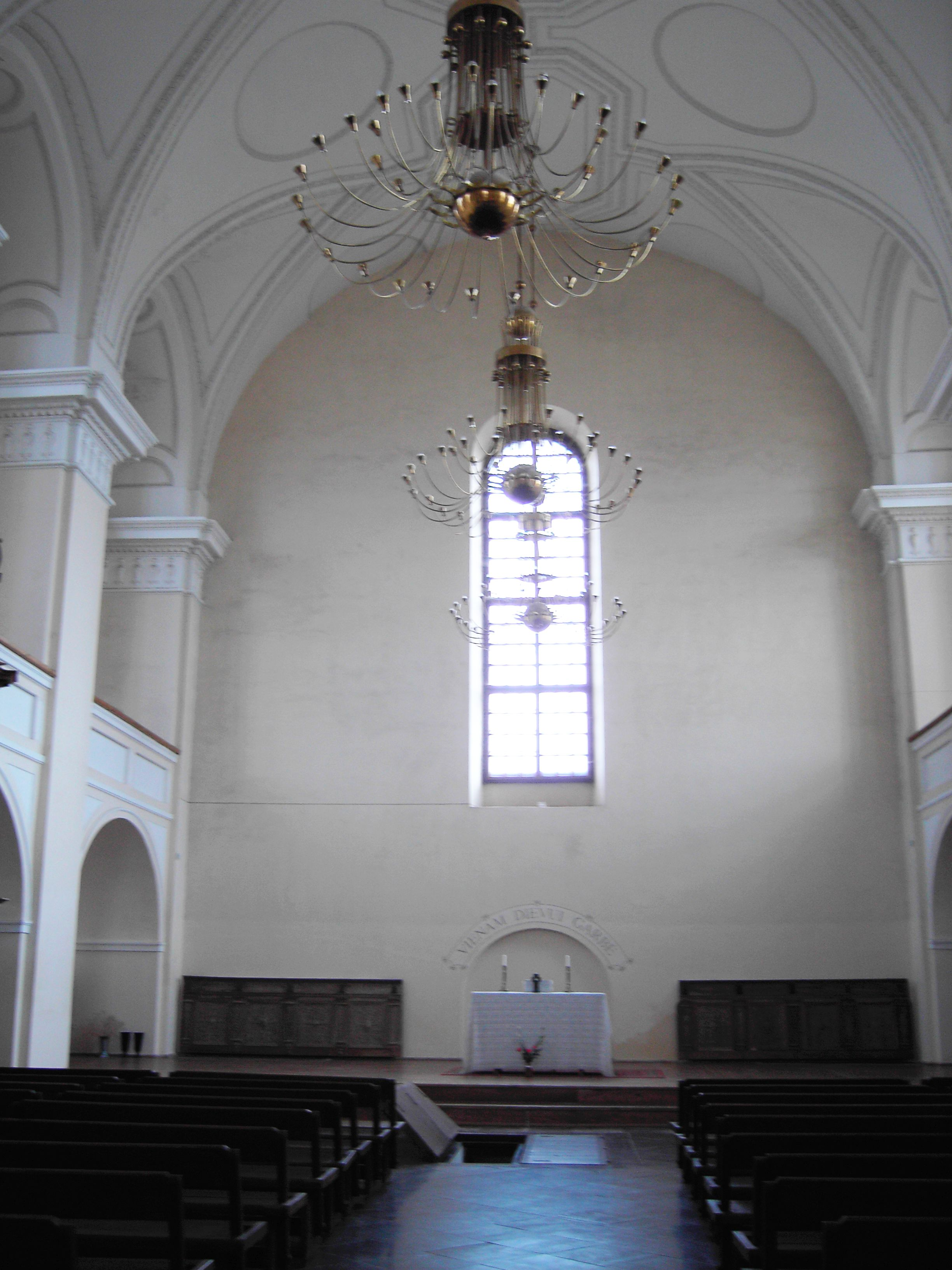 Wnętrze kościoła kalwińskiego w Kiejdanach